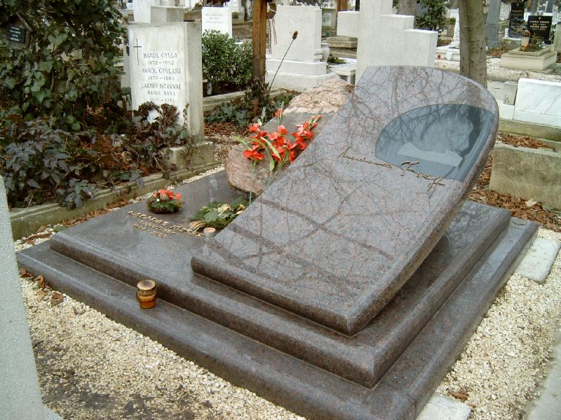 Madaras József sírja Budapesten. Farkasréti temető: 1-1.